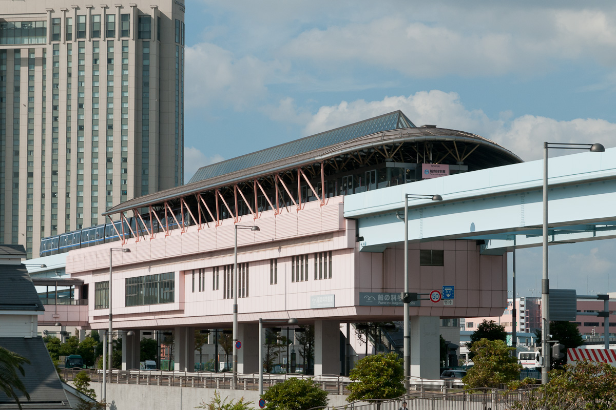 ゆりかもめ船の科学館駅。